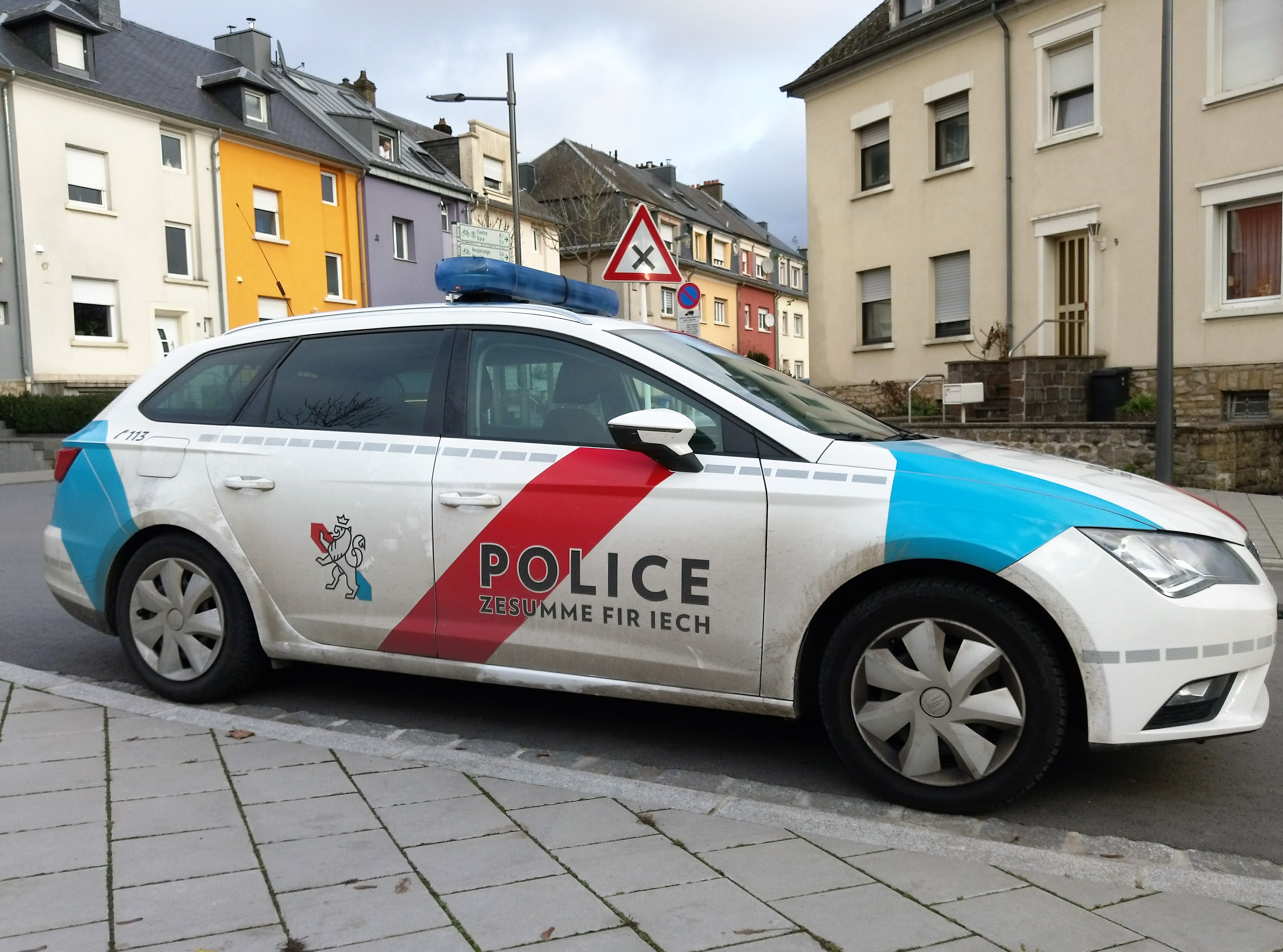 Luxembourg. Voiture de police au nouveau visuel.